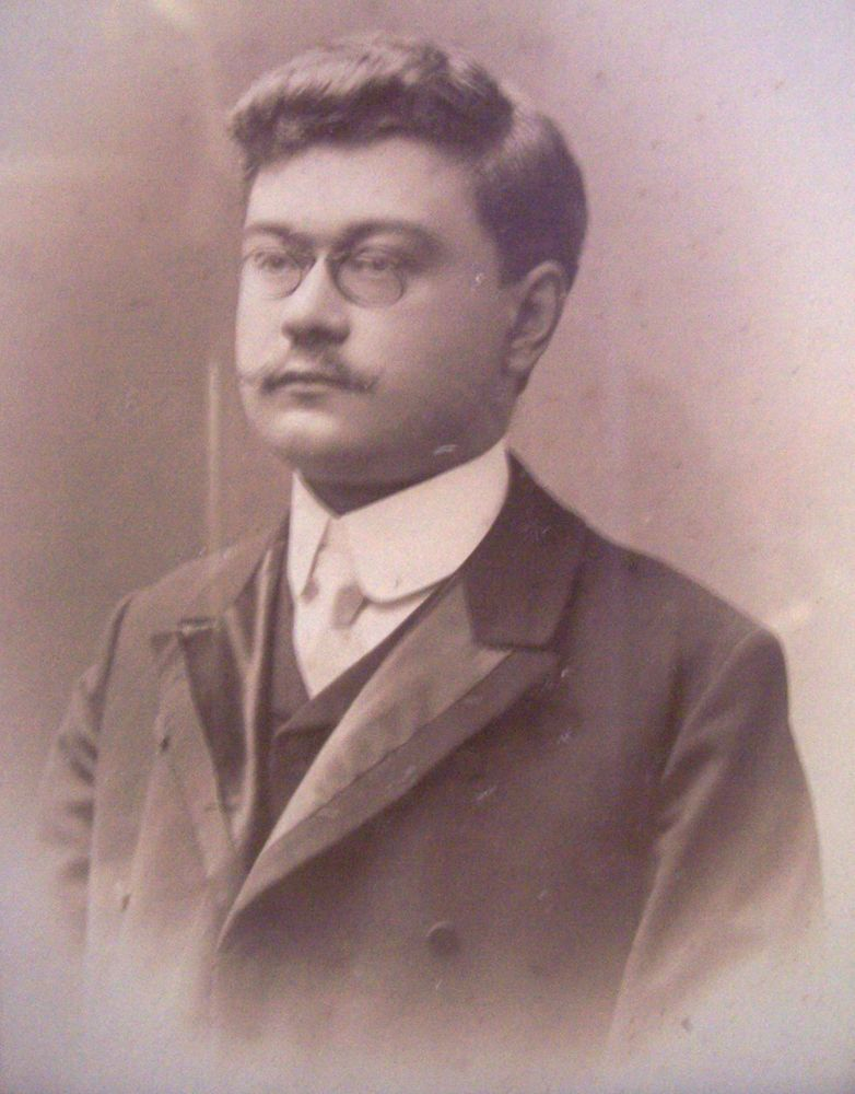 Vojtěch Říhovský (1871 - 1950), Český hudební skladatel.